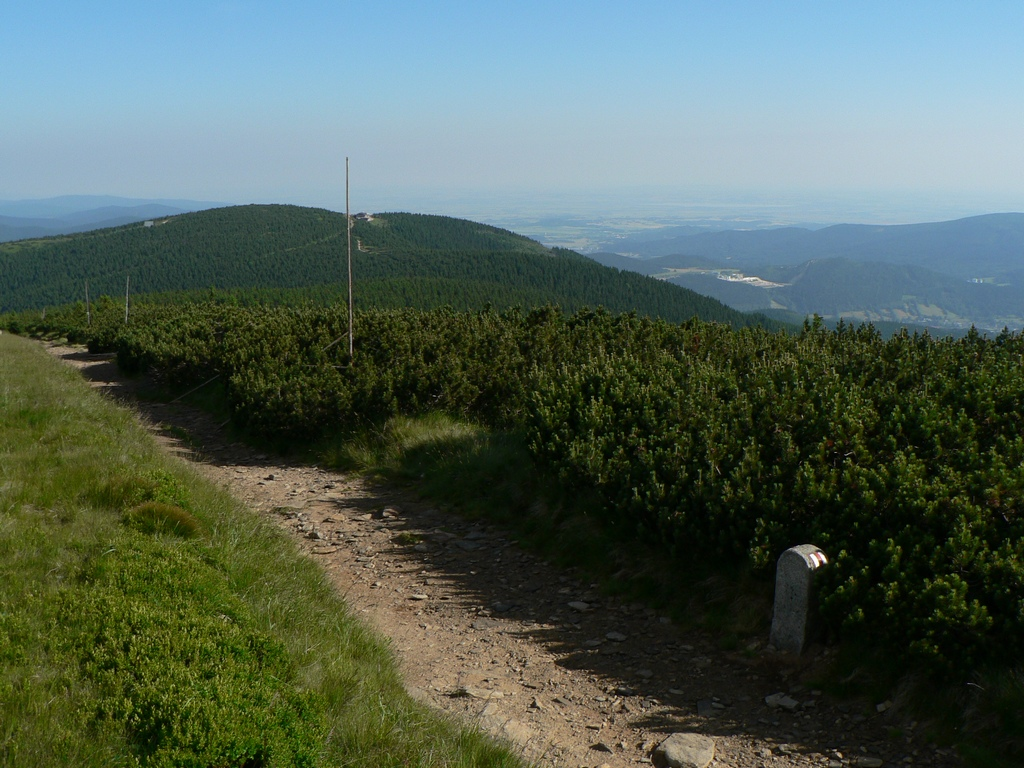 Pohled na Šerák z Keprníku